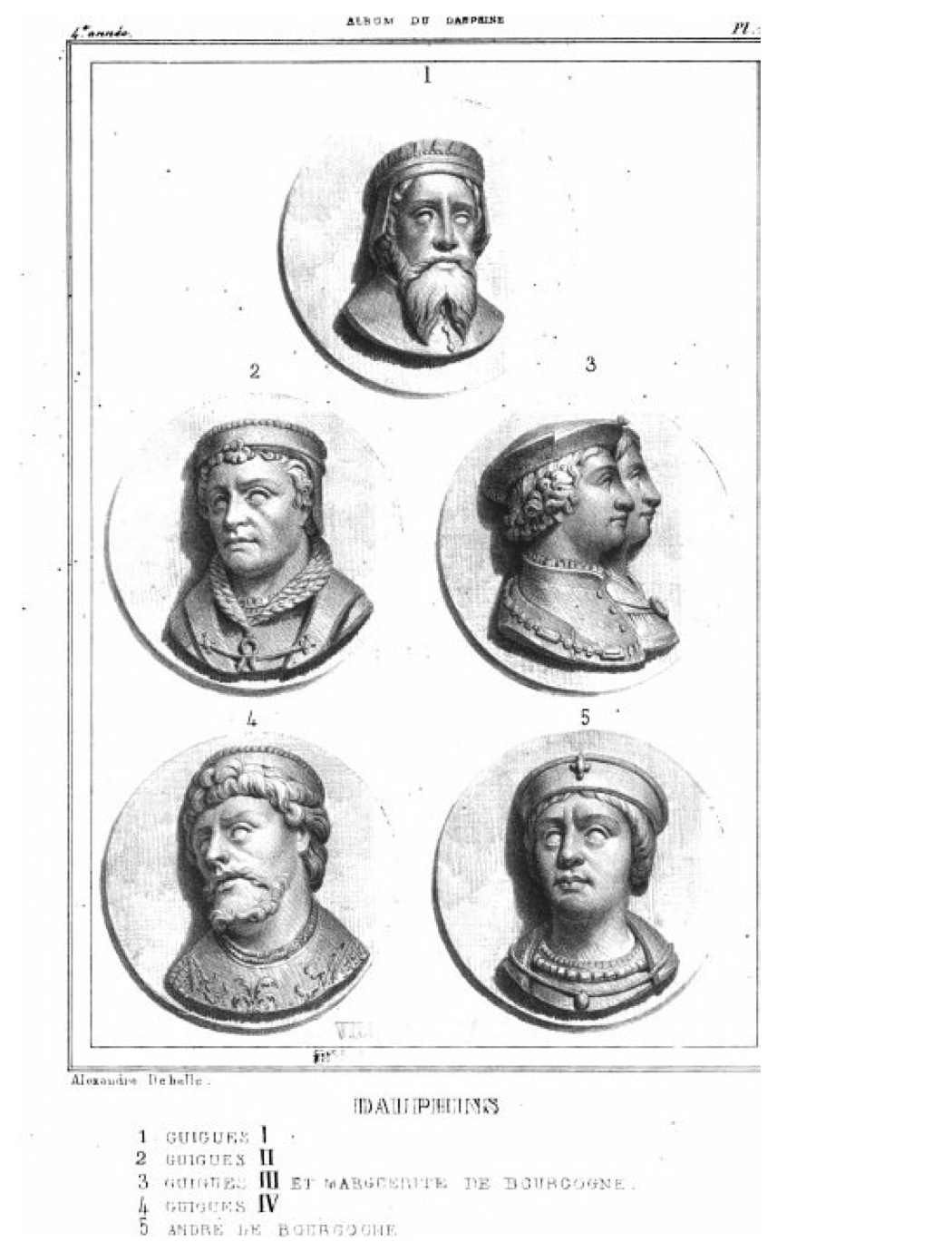 Album du Dauphiné - tome IV, litographie des Dauphins : 1. Guigues I, 2. Guigues II, 3. Guigues III et Marguerite de Bourgogne, 4. Guigues IV, 5. André de Bourgogne